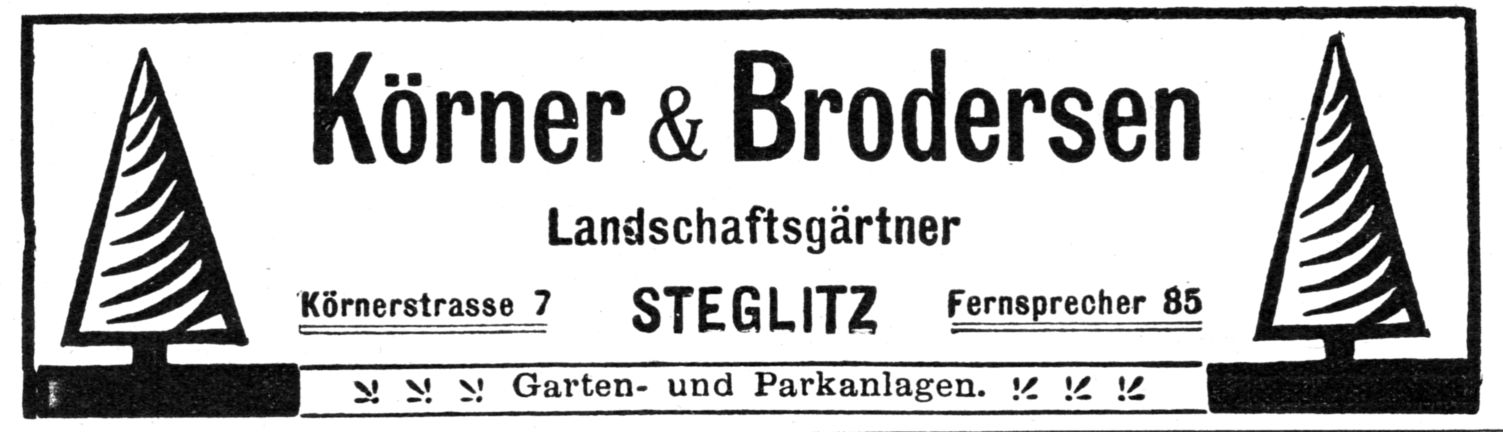 Werbung der Firma Körner & Brodersen, Landschaftsgärtner in Steglitz